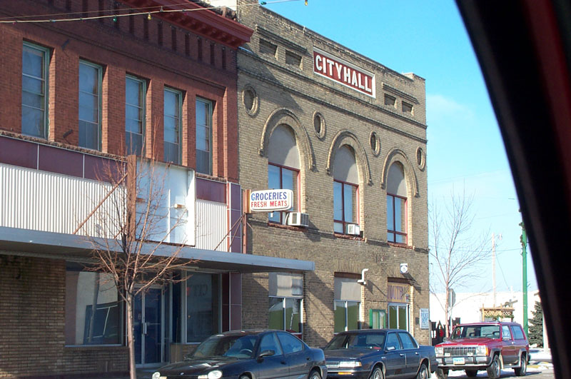 Barnesville, Minnesota. From .